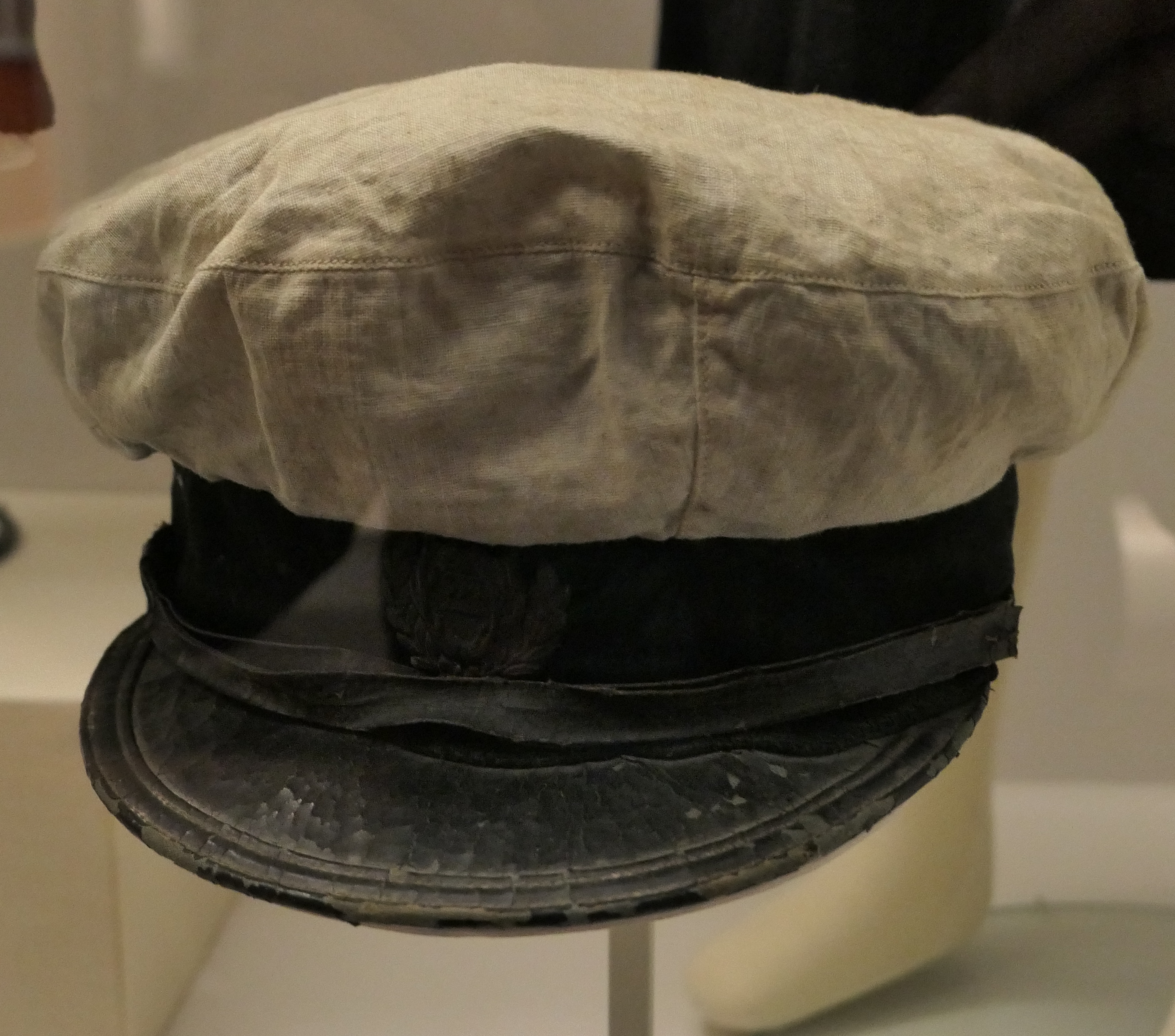 中文（台灣）: 新竹第一公學校學生帽。攝於國立臺灣歷史博物館。